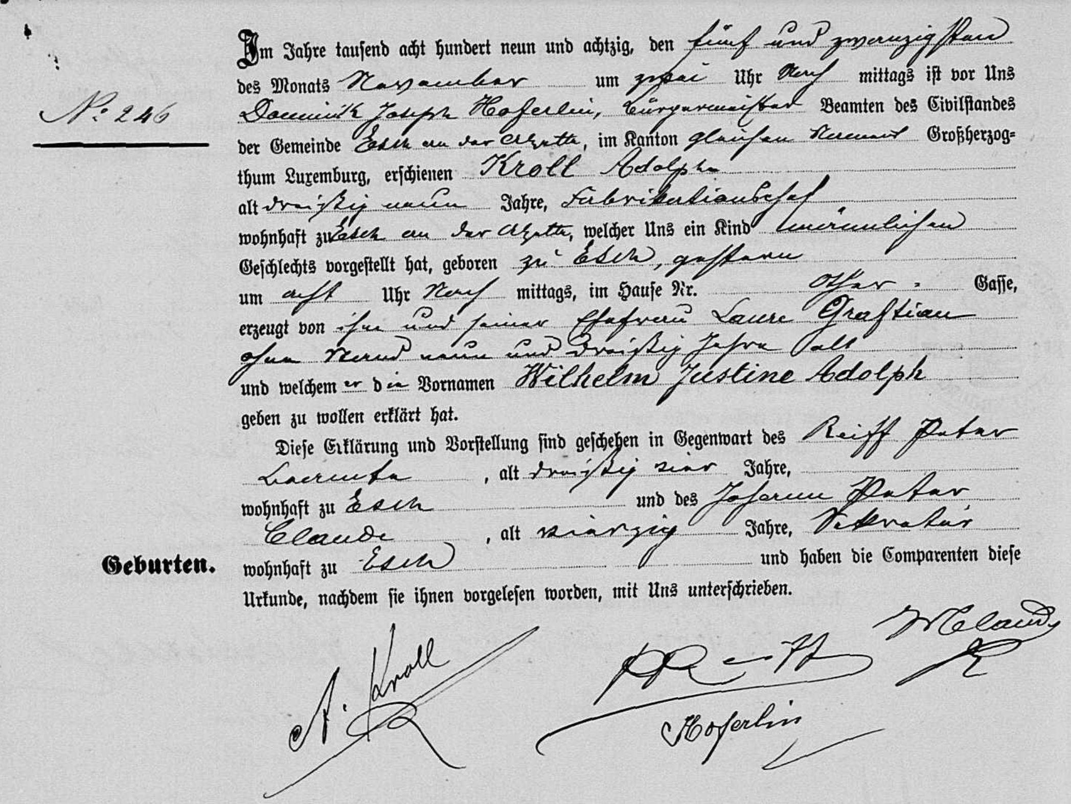 Geburtseintrag im Register der Gemeinde Esch Alzette